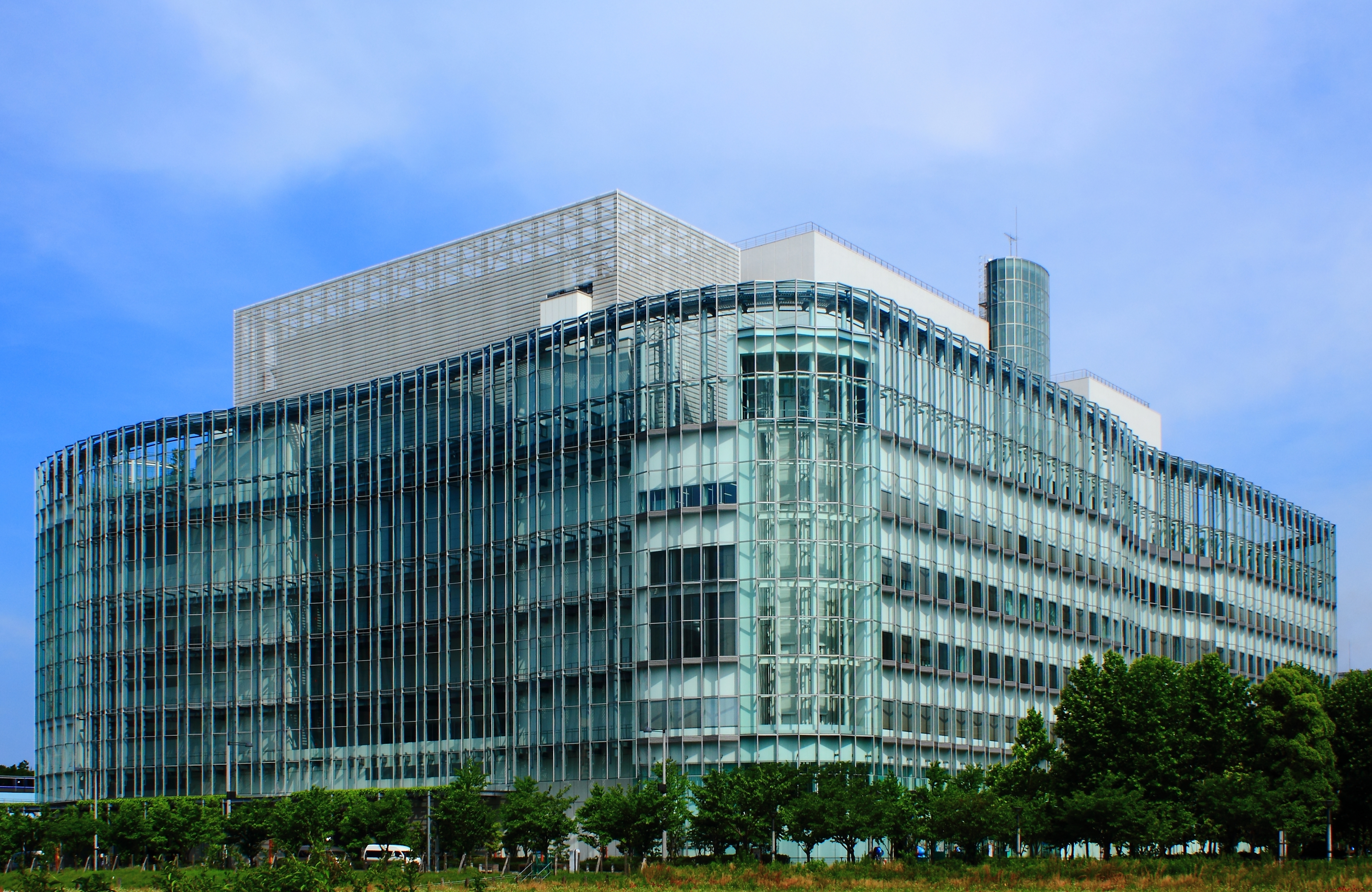 フジテレビ湾岸スタジオ（東京都江東区）